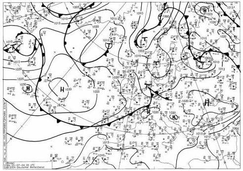 Wetterkarte DWD